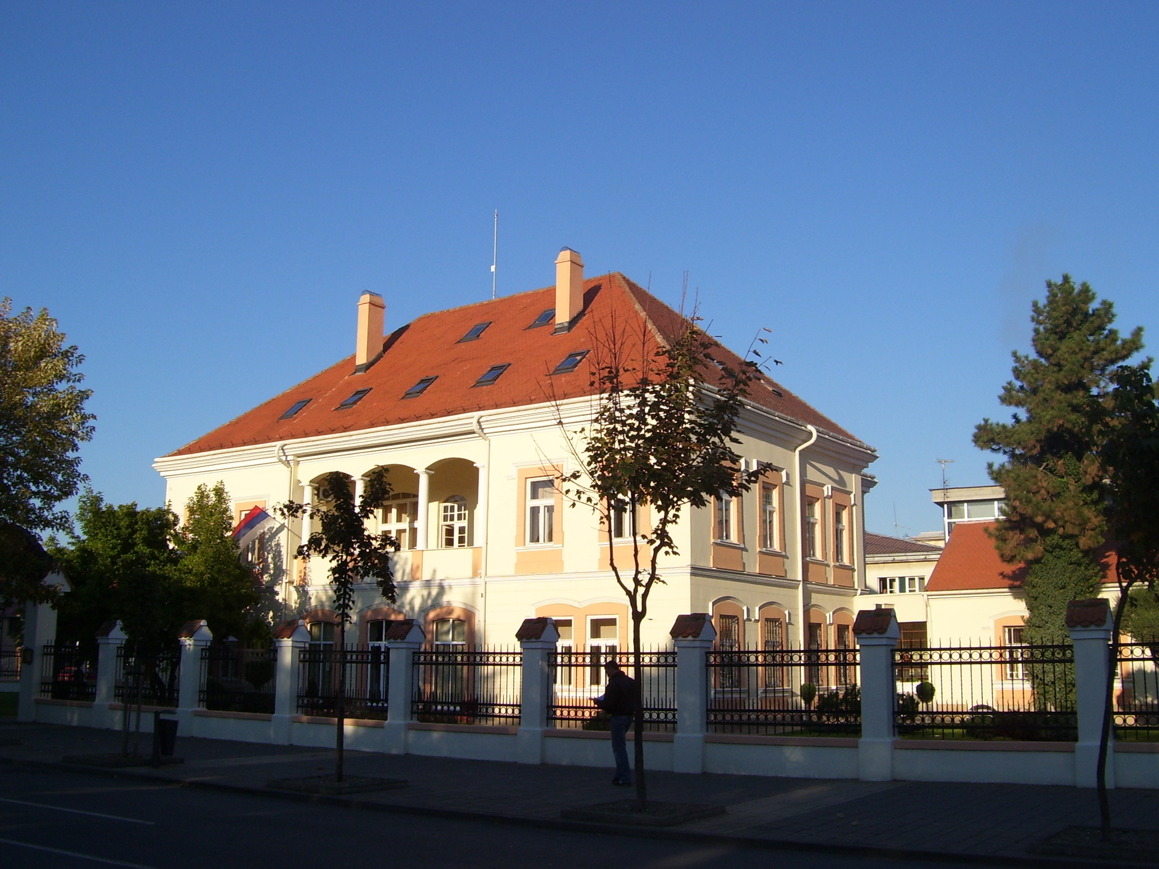 Аутор је корисник: SRB Maric IT Слика је урађена обичним фотоапаратом. Датум: 16-10-2011.